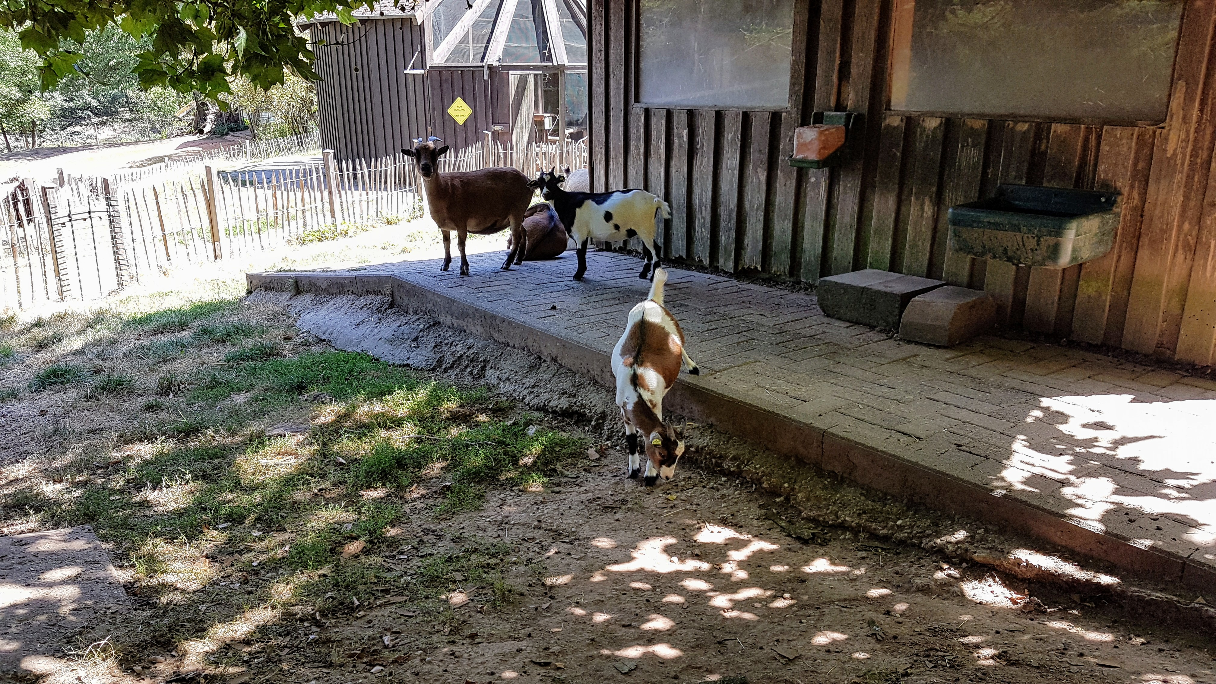 Einige Ziegen, im Streichelzoo des Neunkircher Zoos aufgenommen